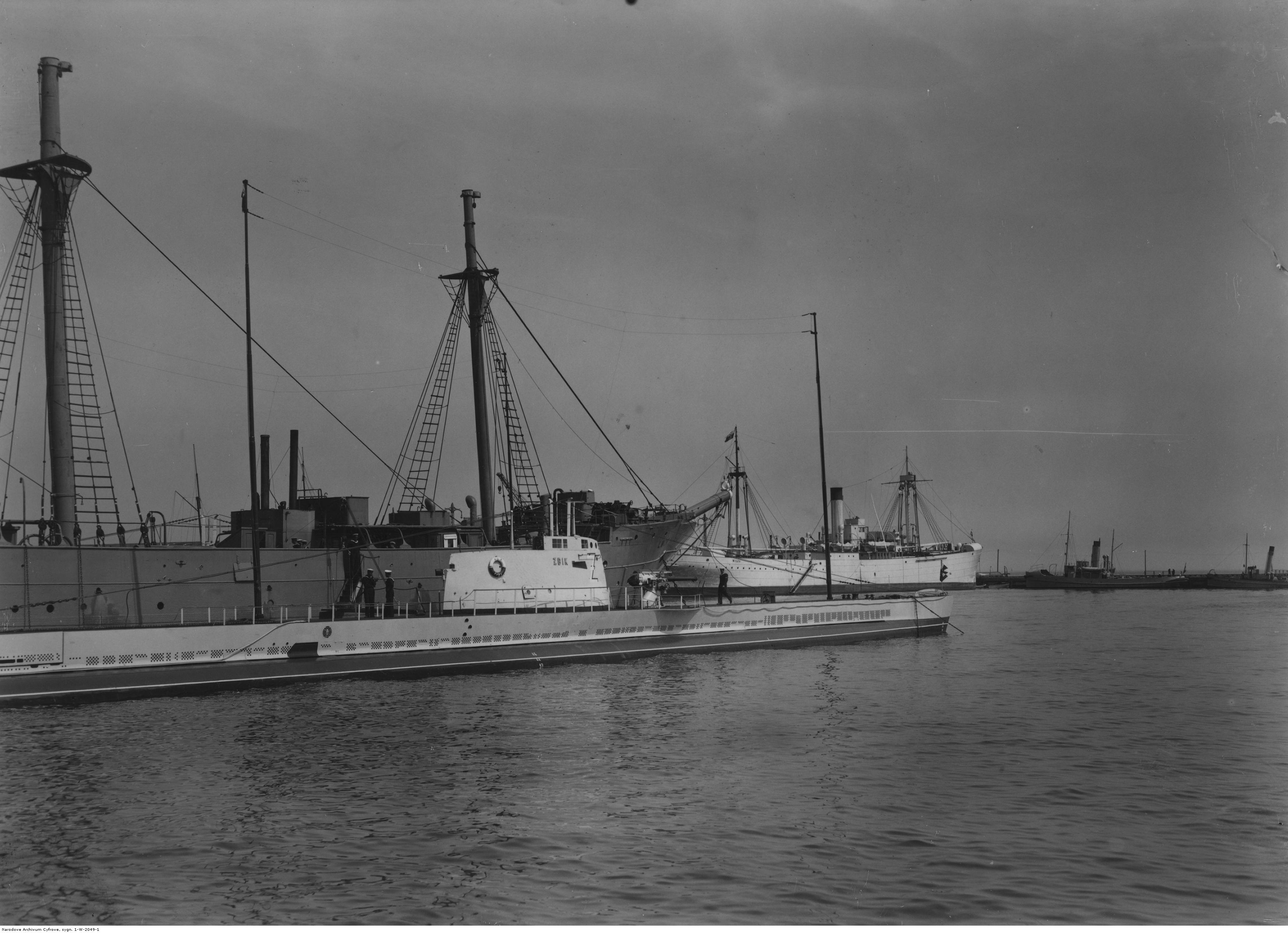 Okręt podwodny "Żbik" w porcie wojennym w czasie Święta Morza. Za nim widoczne okręty: żaglowiec "Lwów" (hulk) i transportowiec ORP "Wilja".